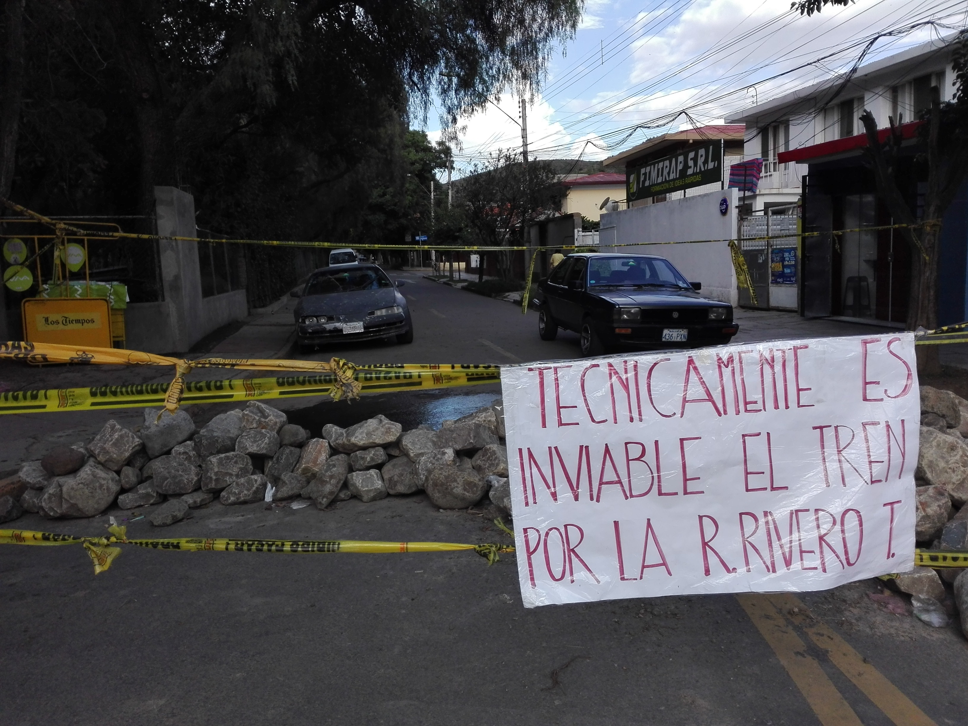 Protesta de vecinos del Jardín Botánico de Cochabamba, en rechazo al proyecto del Tren Metropolitano. Fotografía realizada el 29 de febrero de 2019.